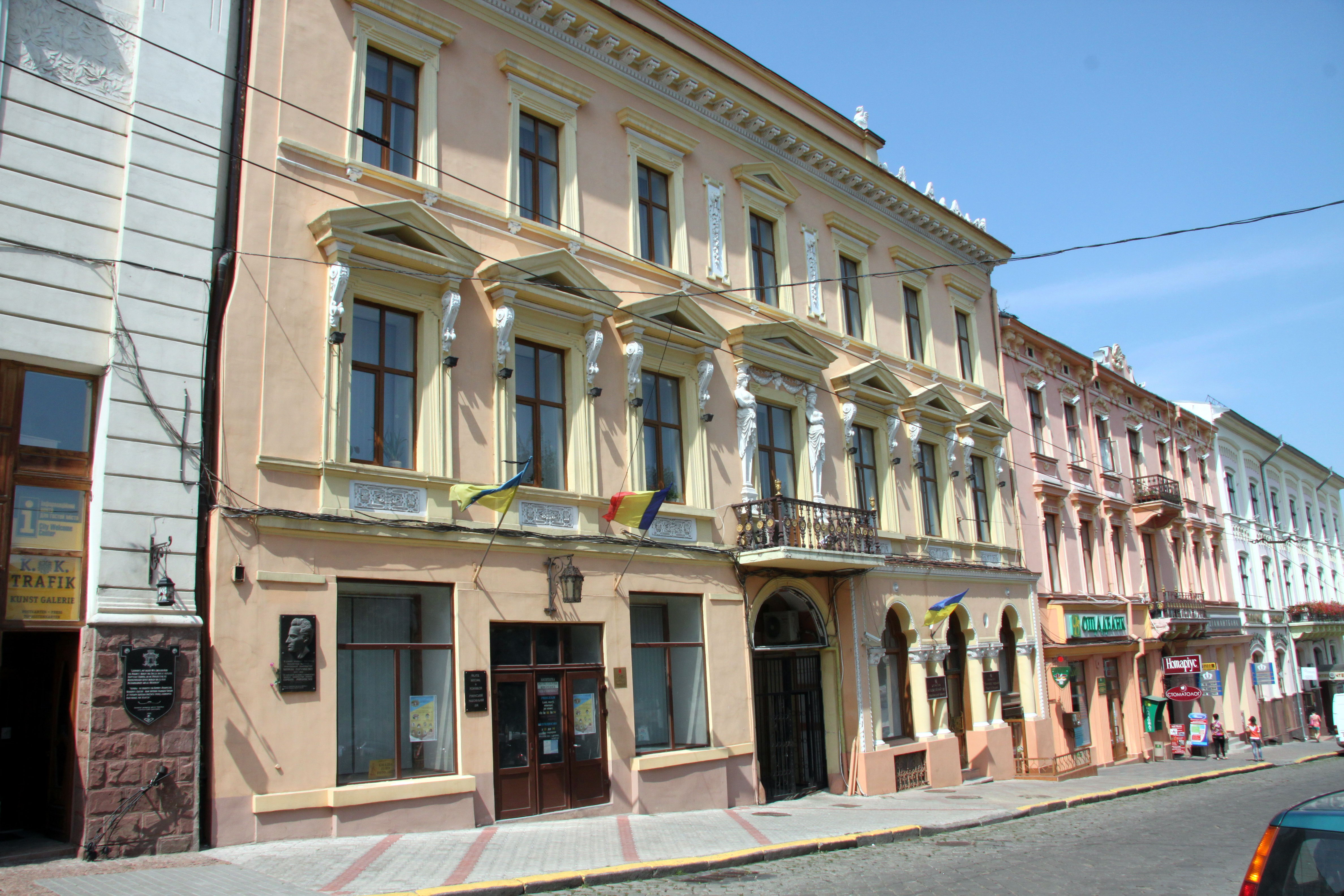 Готель "Вайс", Центральна площа, 9, Чернівці